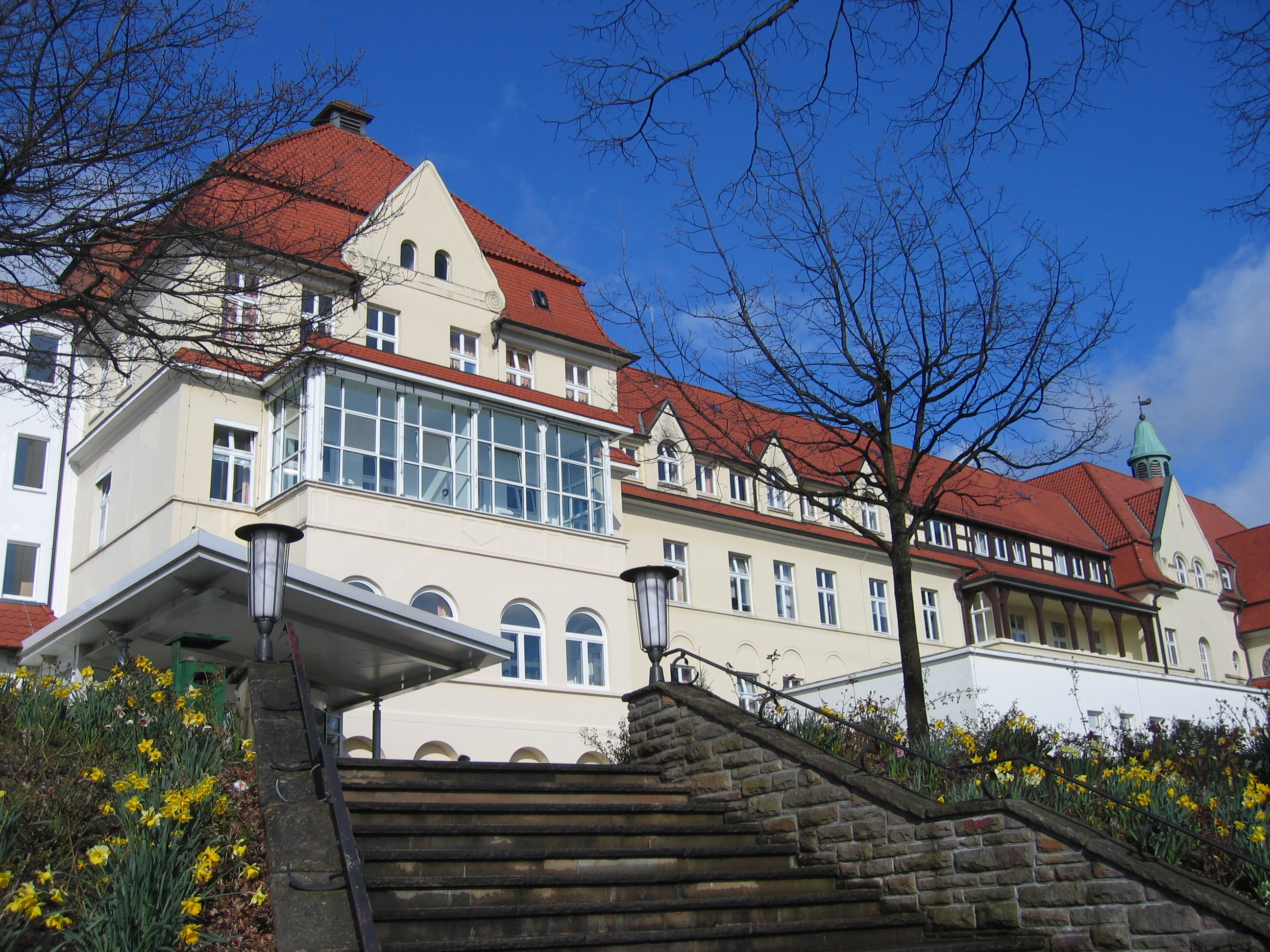 Marien-Hospital Arnsberg